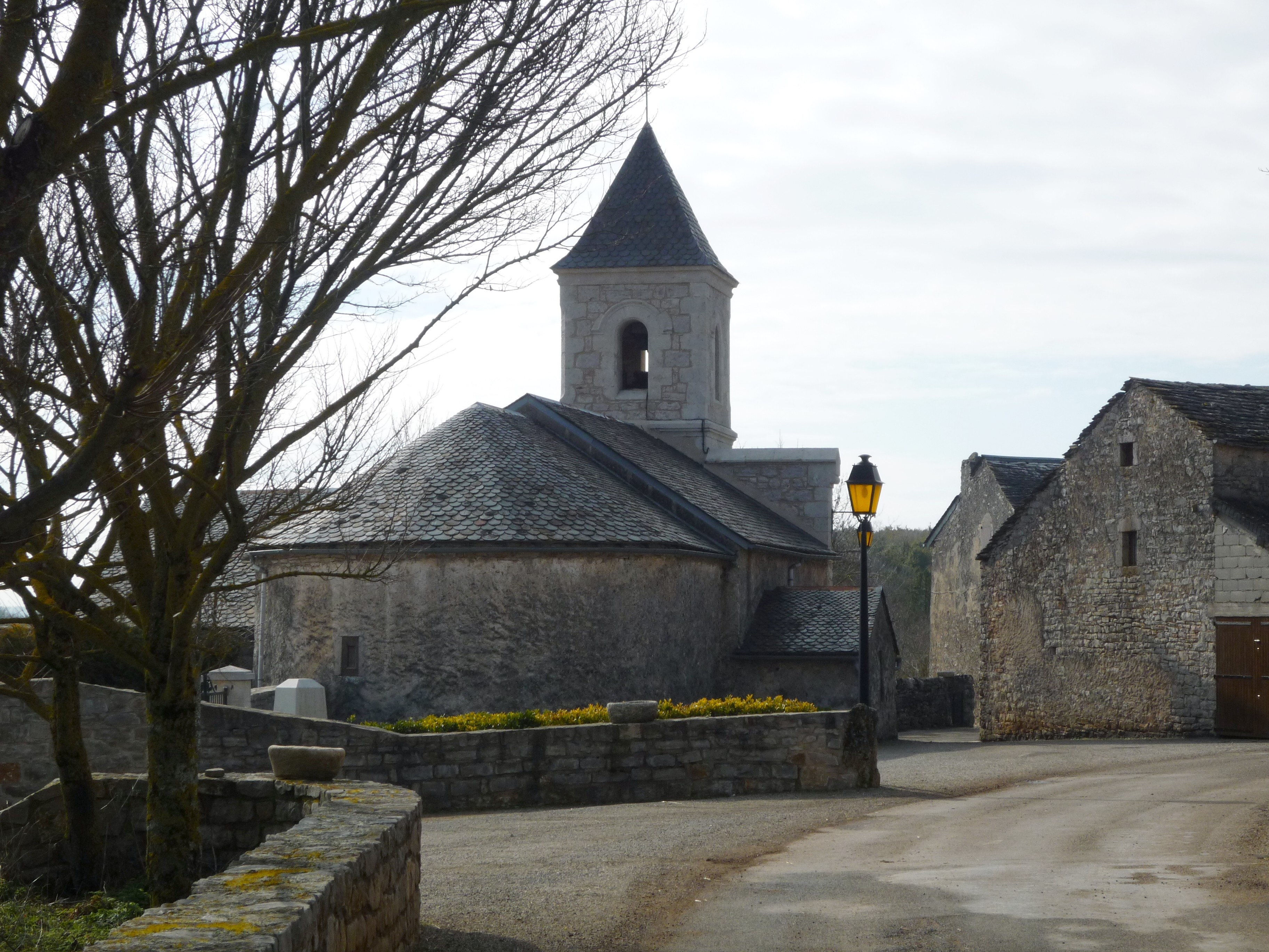 Revens